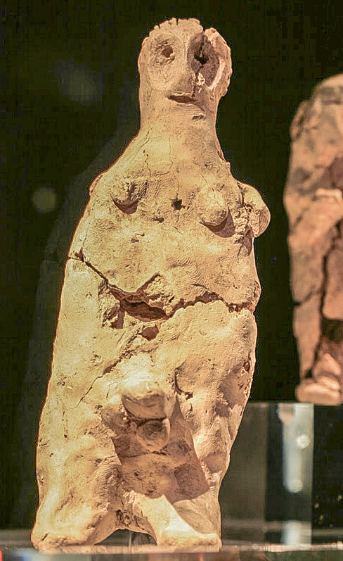 Zauber-Puppe